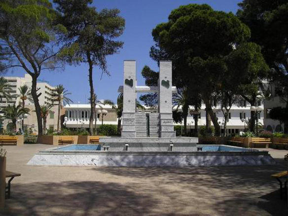 Fontana in Misurata (Libia) Licensing Categoria:Misurata